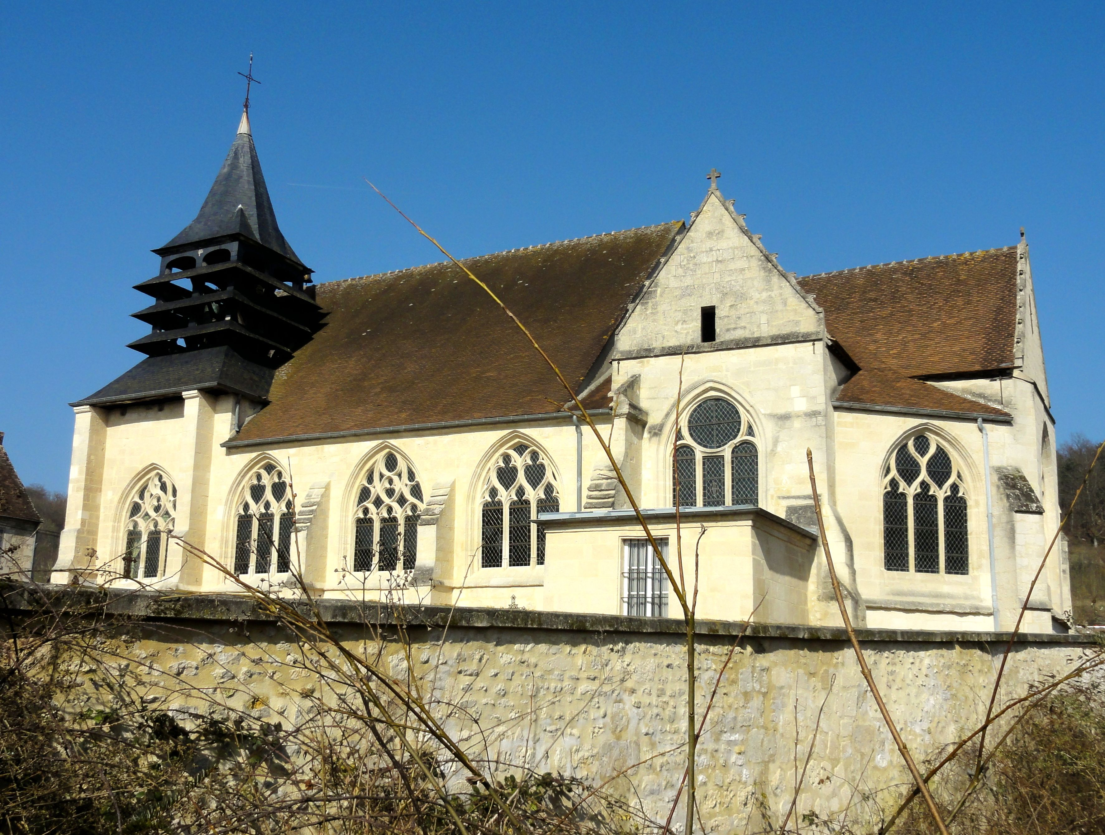 Vue de l'église depuis le sud.